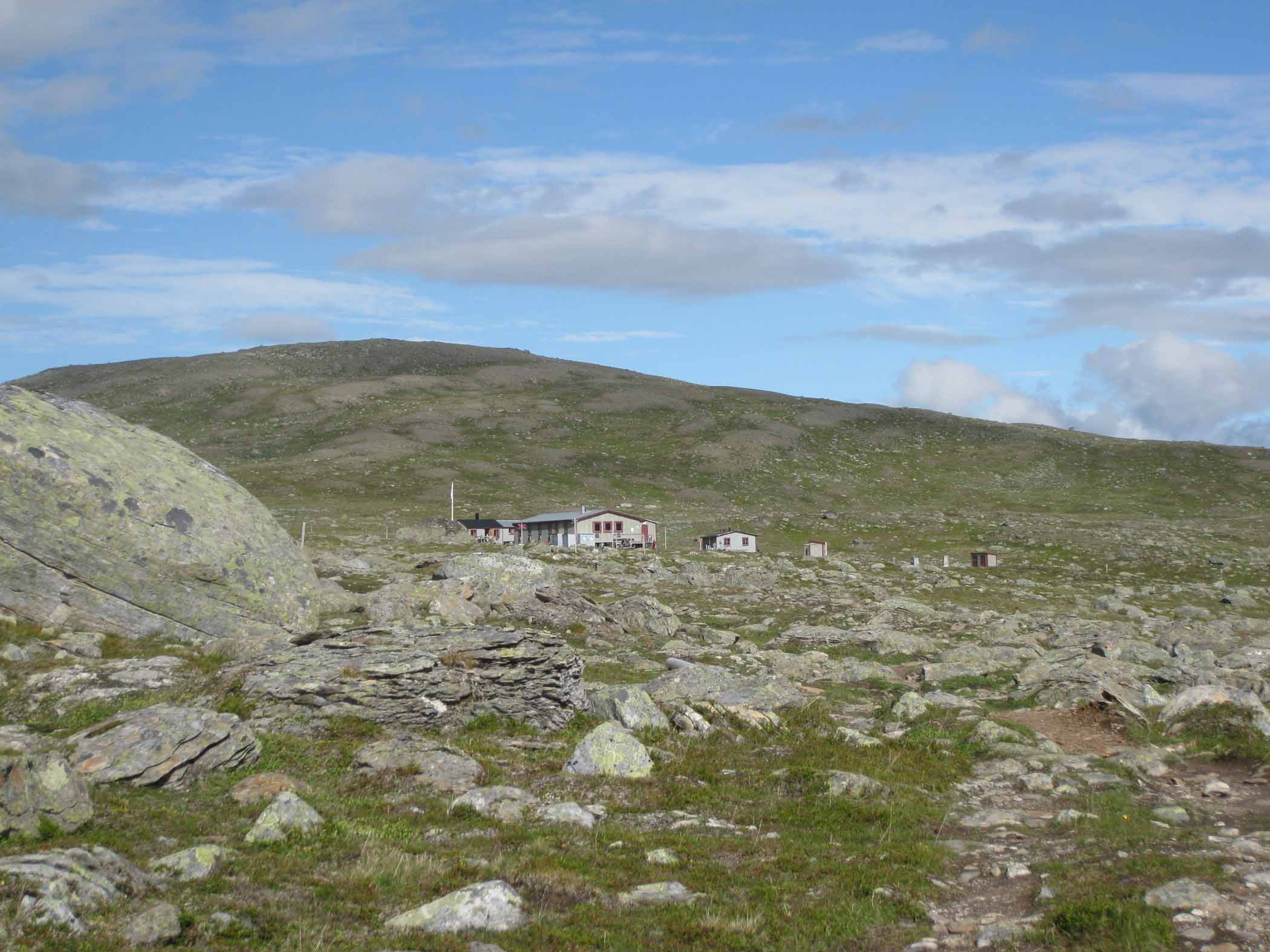 STFs fjällstuga Gåsen med fjället Gåsen bakom